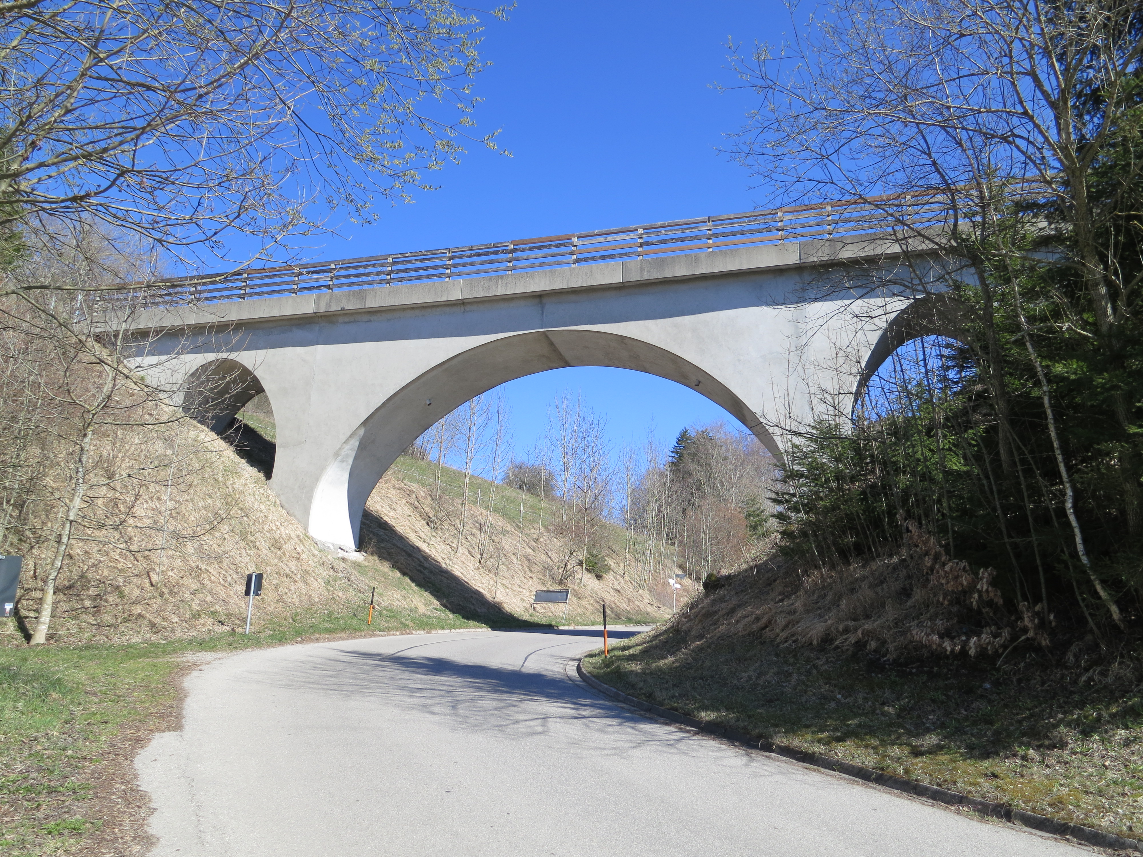 Osterzeller Viadukt an der stillgelegten Bahnstrecke Kaufbeuren–Schongau von Süden (Kilometer 13,4)